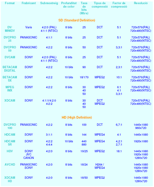 Taula dels formats de captura de video i de les seves característiques.